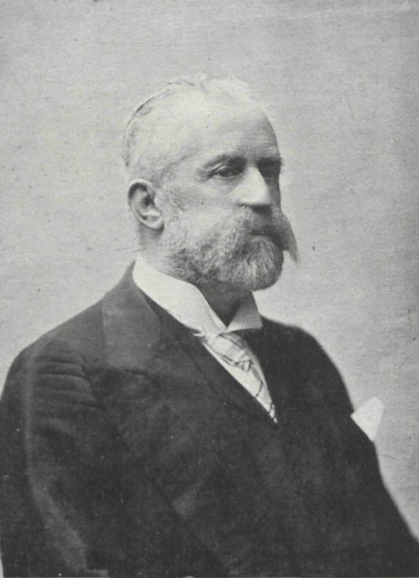 Francisco Romero Robledo. Eminente político (Fot. Franzen.)